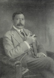 Otto Nepomuk hrabě Harrach, (1863-1935). český šlechtic